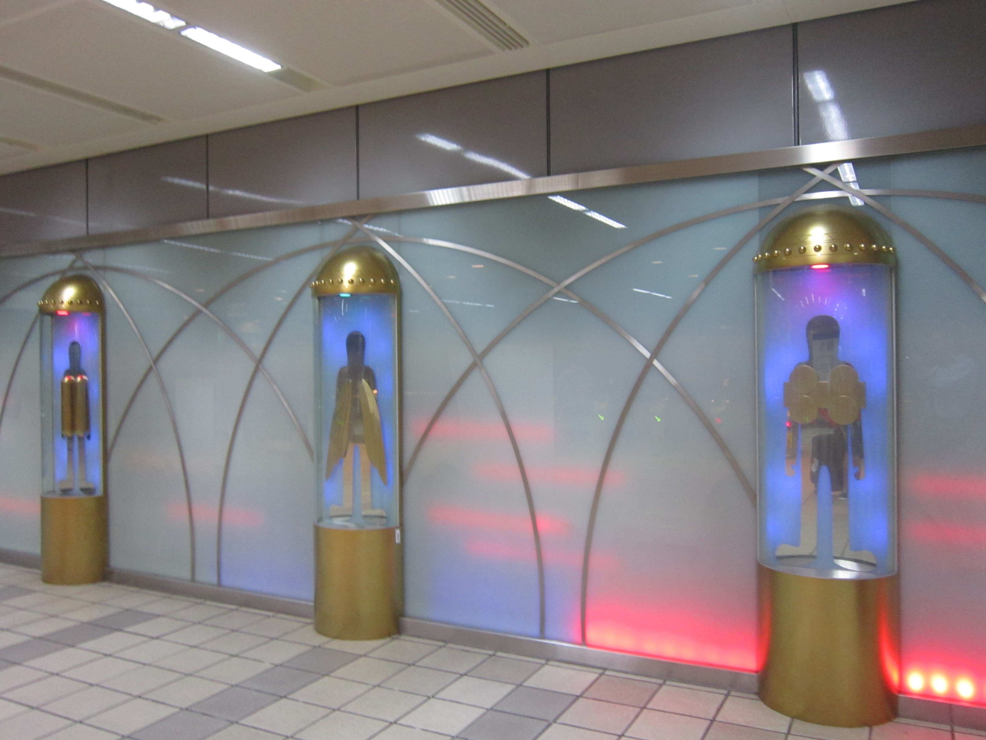 松山機場捷運站內的公共藝術作品(飛行計畫)